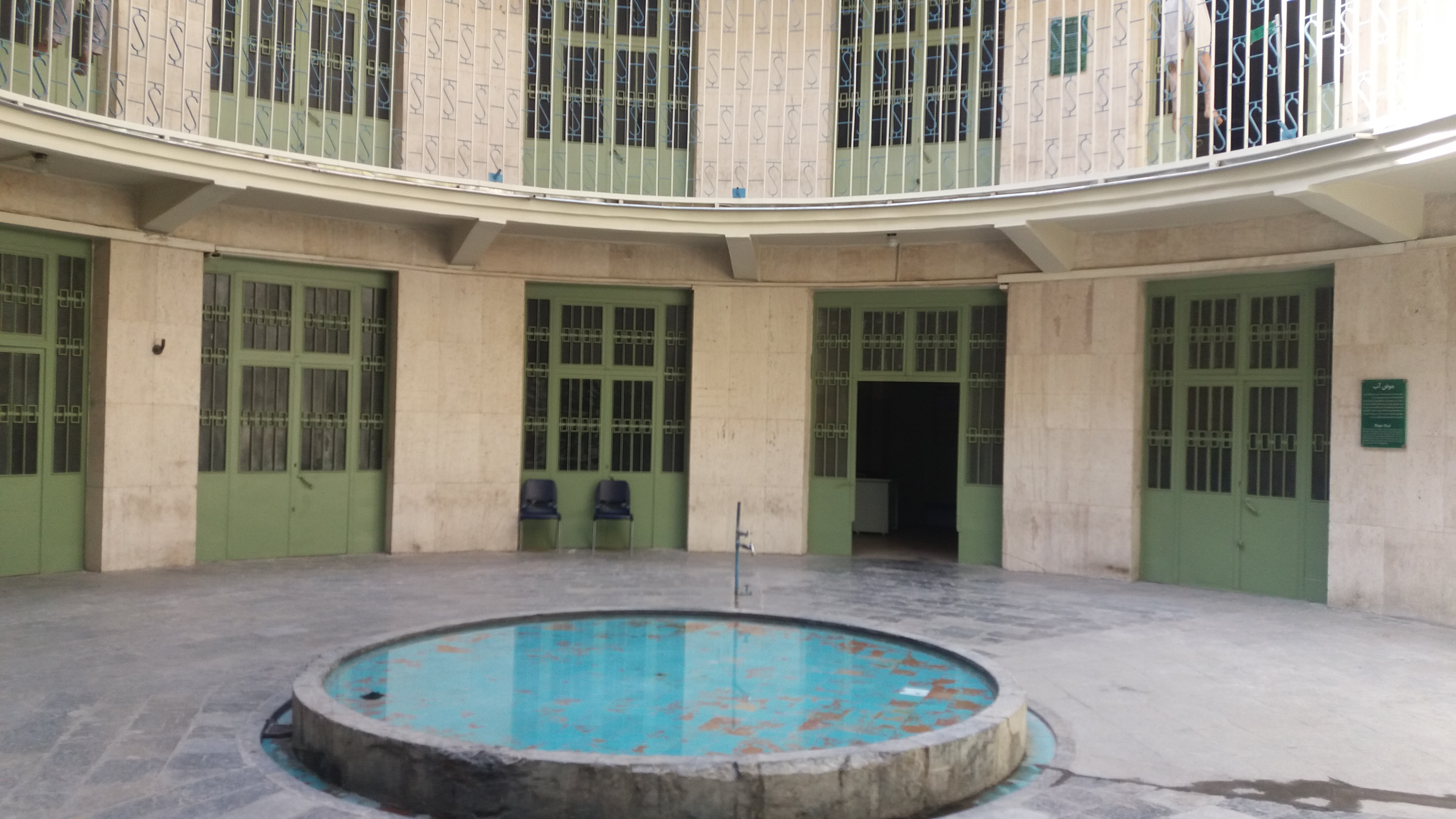 محوطه طبقه اول موزه عبرت